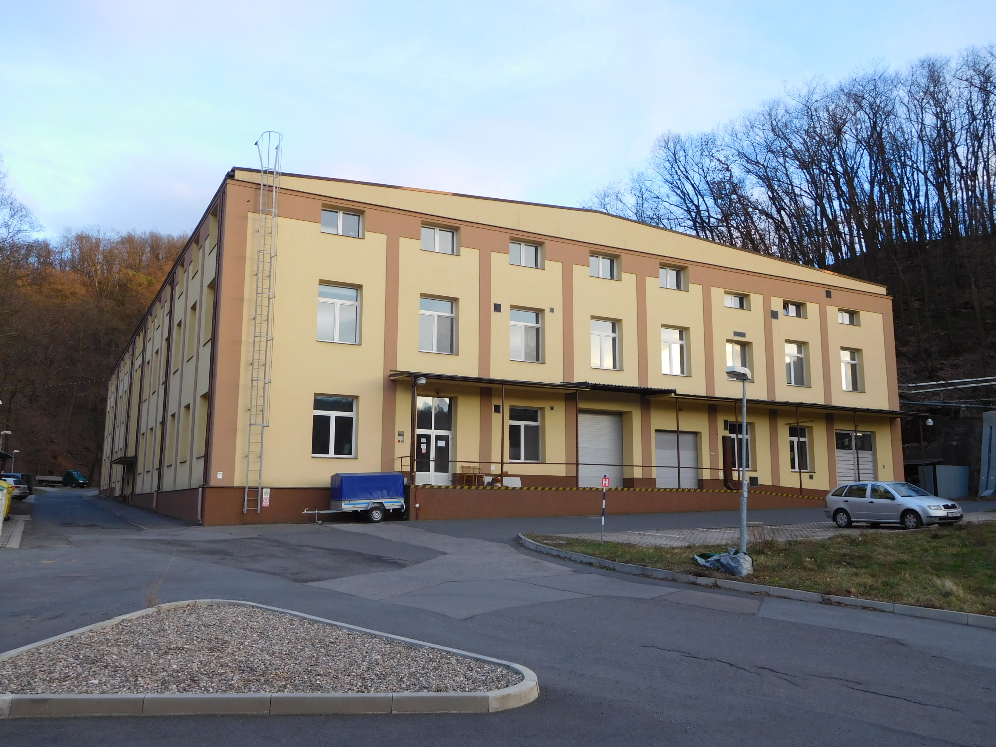 Řež, Ústav jaderné fyziky, budova cyklotronu